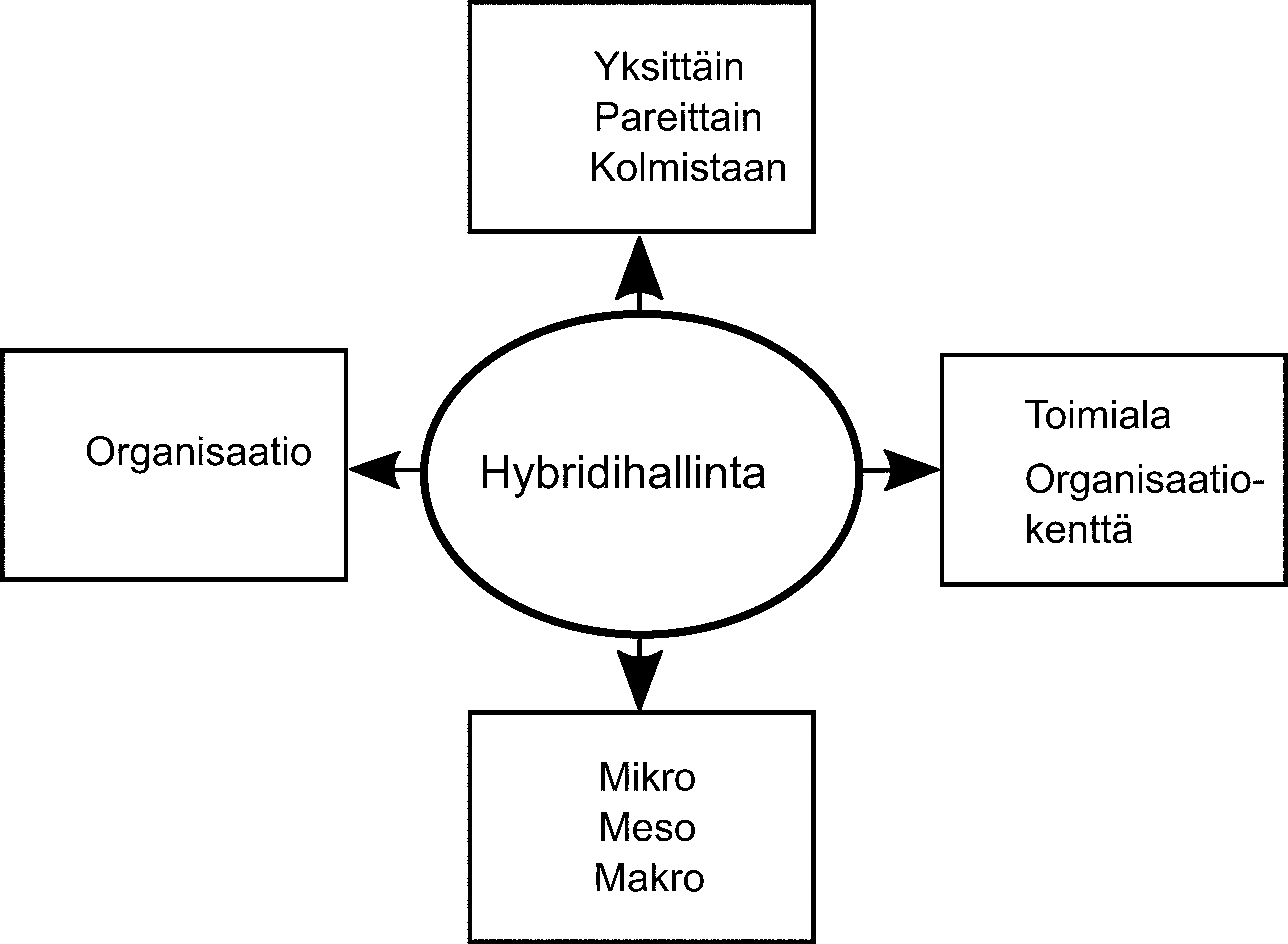 Hybridihallinnan tasot (Johanson & Vakkuri 2017)